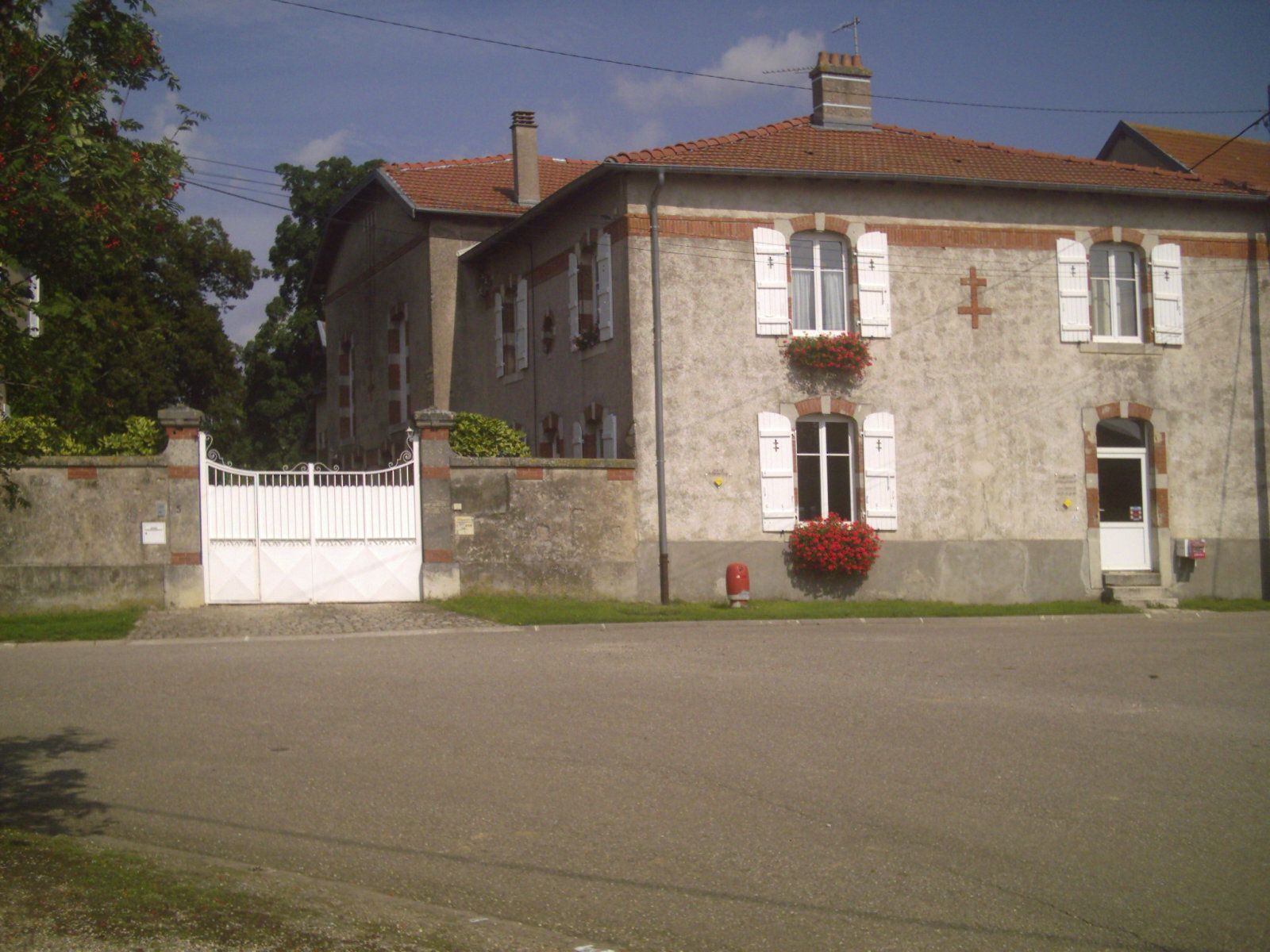 Maison forte a Arraye